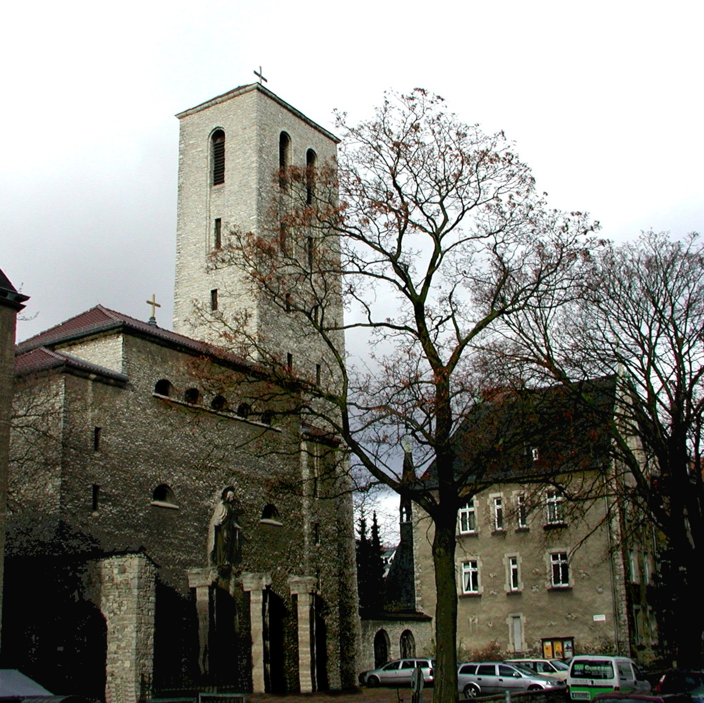 St. Marienkirche in Berlin-Karlshorst